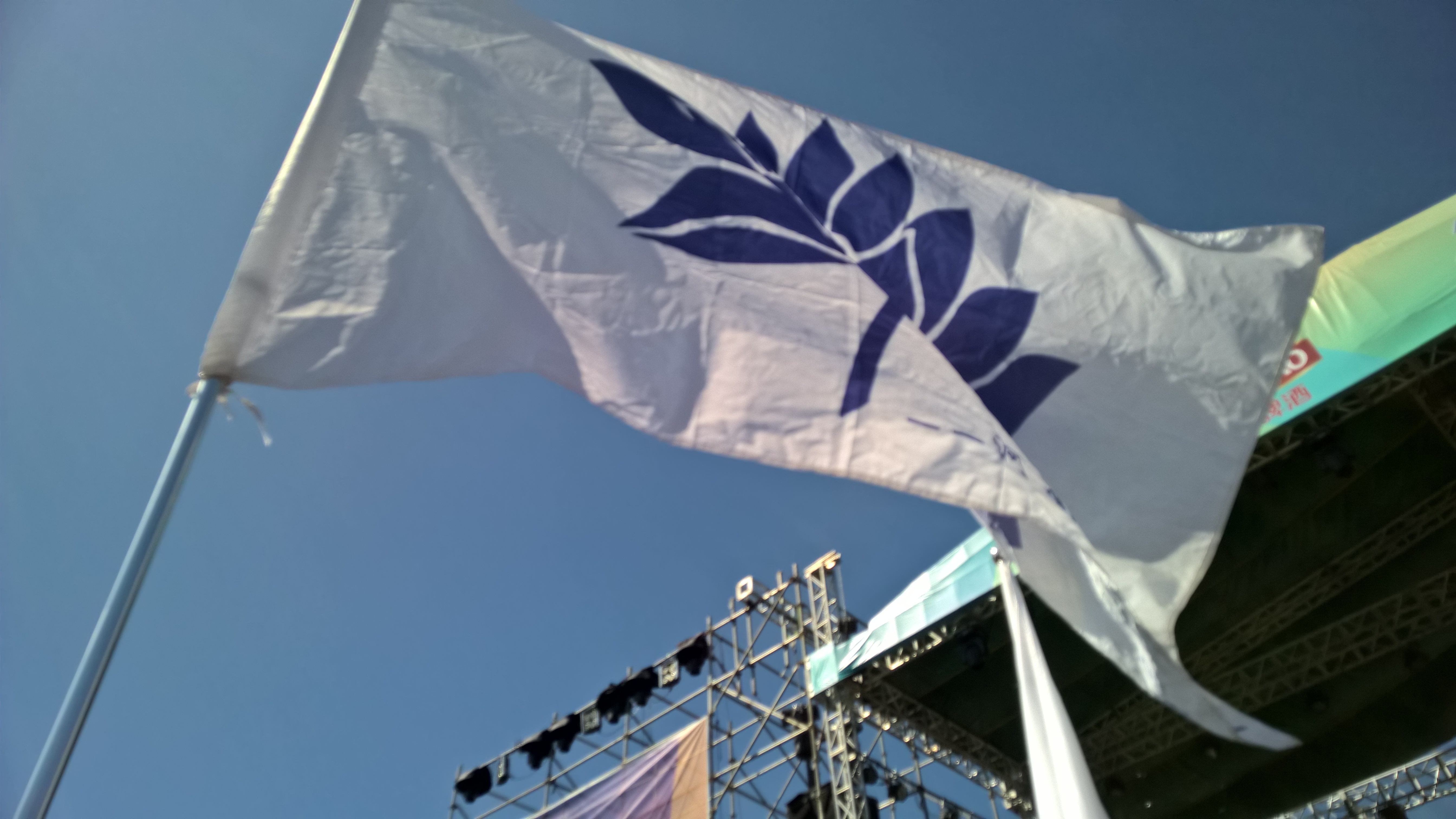 中文（中国大陆）: 蓝莲花旗帜